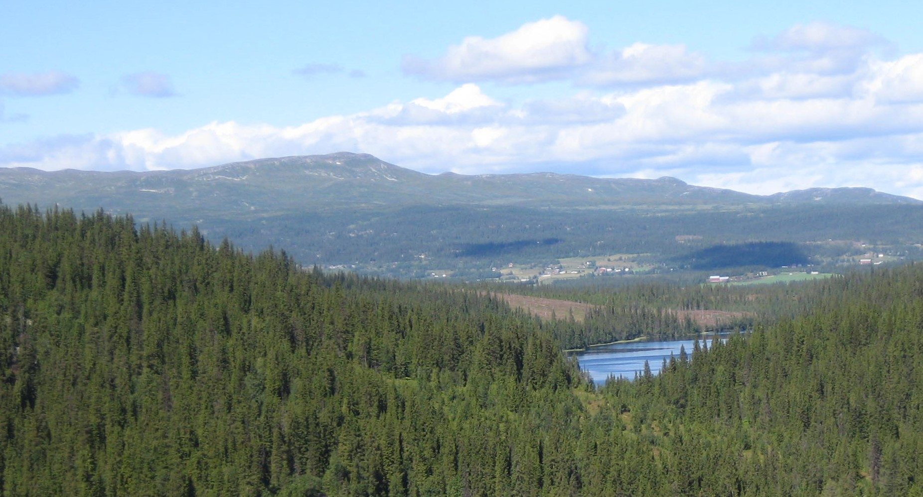 Nord-Torpa og Synnfjellet sett fra Vest-Torpa. Oalen i forgrunnen